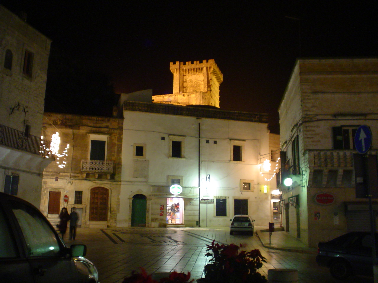 foto non professionali e assolutamente di pubblico dominio da me fatte in data 01/01/06